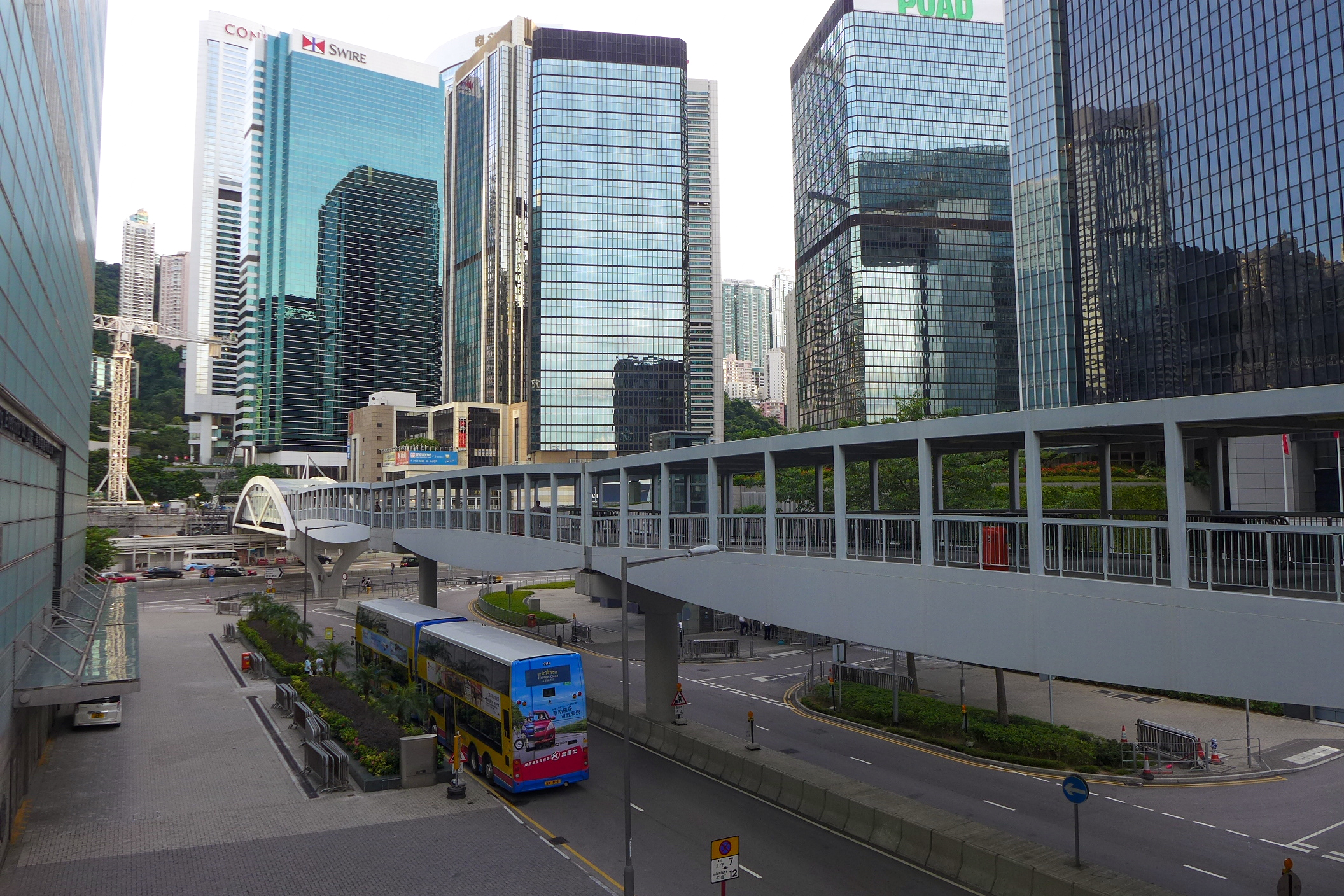 Tim Mei Avenue